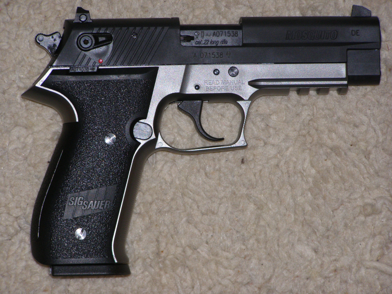 Pistole Sig Sauer Moquito